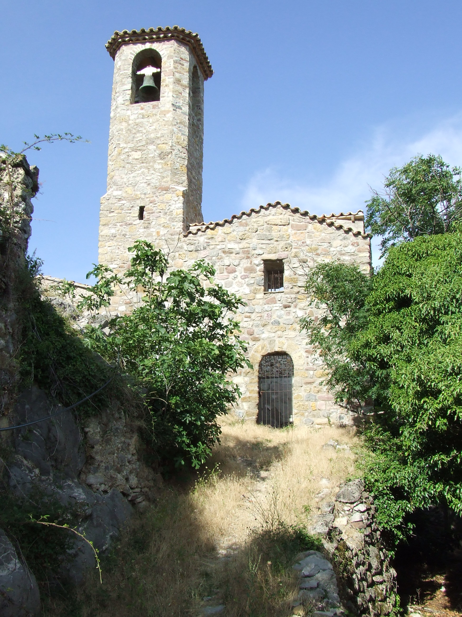 L'església de Cérvoles (Senterada, Pallars Jussà)